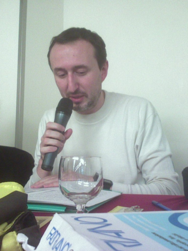 Raffaele Carcano, segretario dell'UAAR per nove anni consecutivi fino al 2016, al Congresso di Rimini del 2007